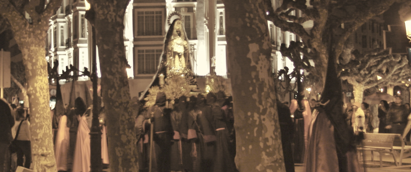 Procesión Sábado DSanto, Nuestra Señora de la Soledad, Burgos, España